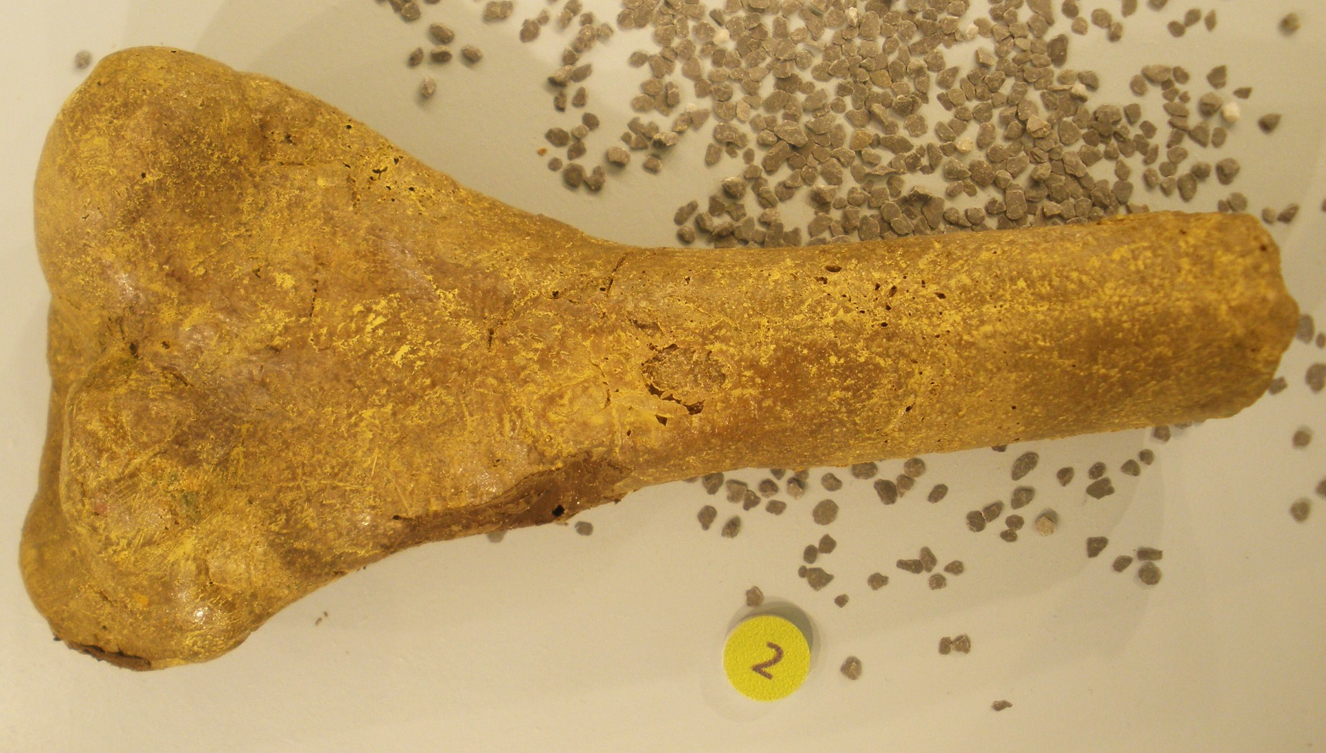 Fossil of Struthiosaurus, an ankylosaurian dinosaur Took the photo at Musee d'Histoire Naturelle, Brussels